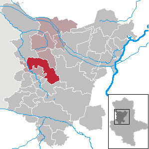 Erxleben in Saxony-Anhalt (Country) - District (Landkreis) Börde